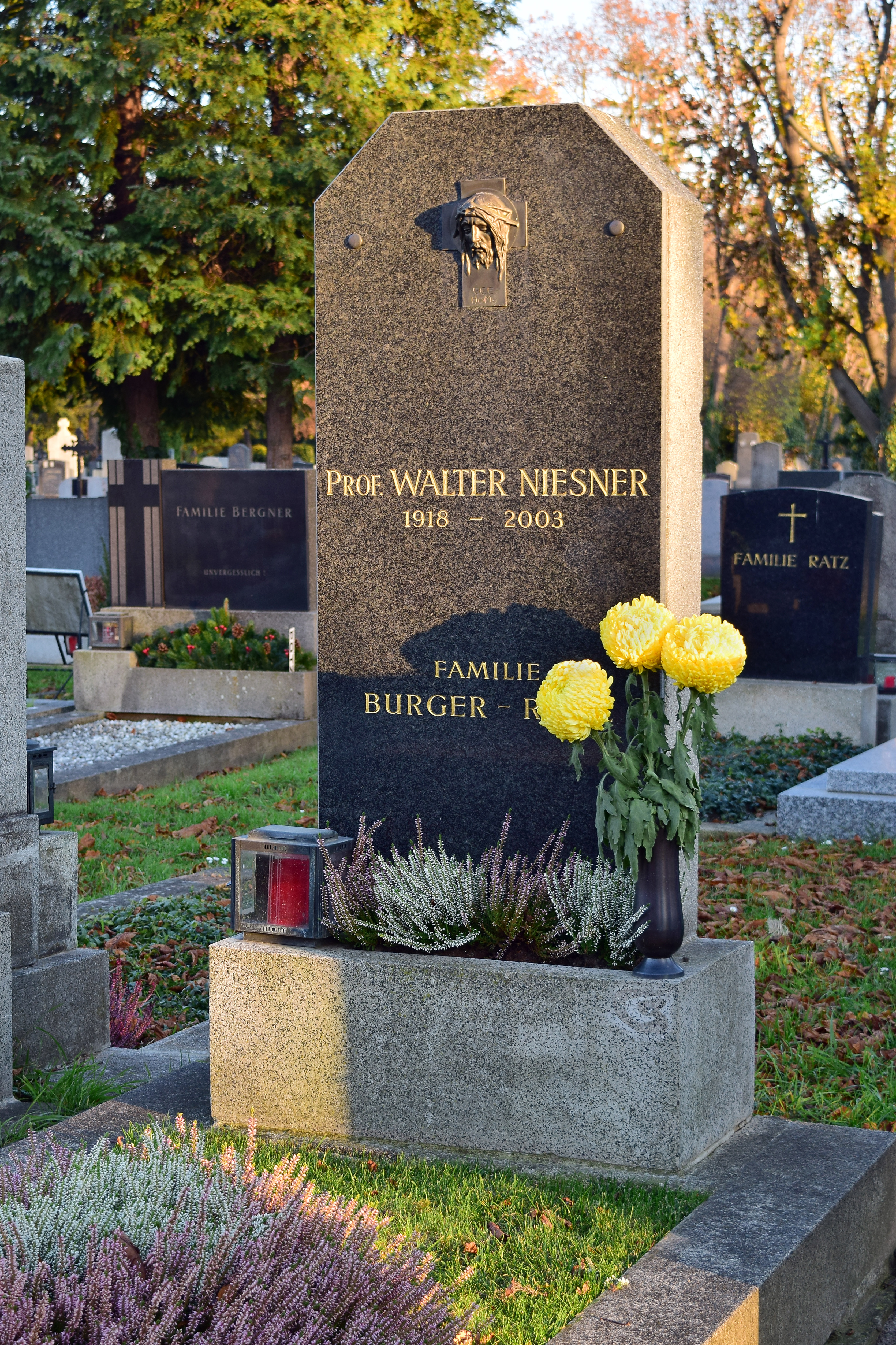 Ehrenhalber gewidmetes Grab von Walter Niesner auf dem Wiener Zentralfriedhof